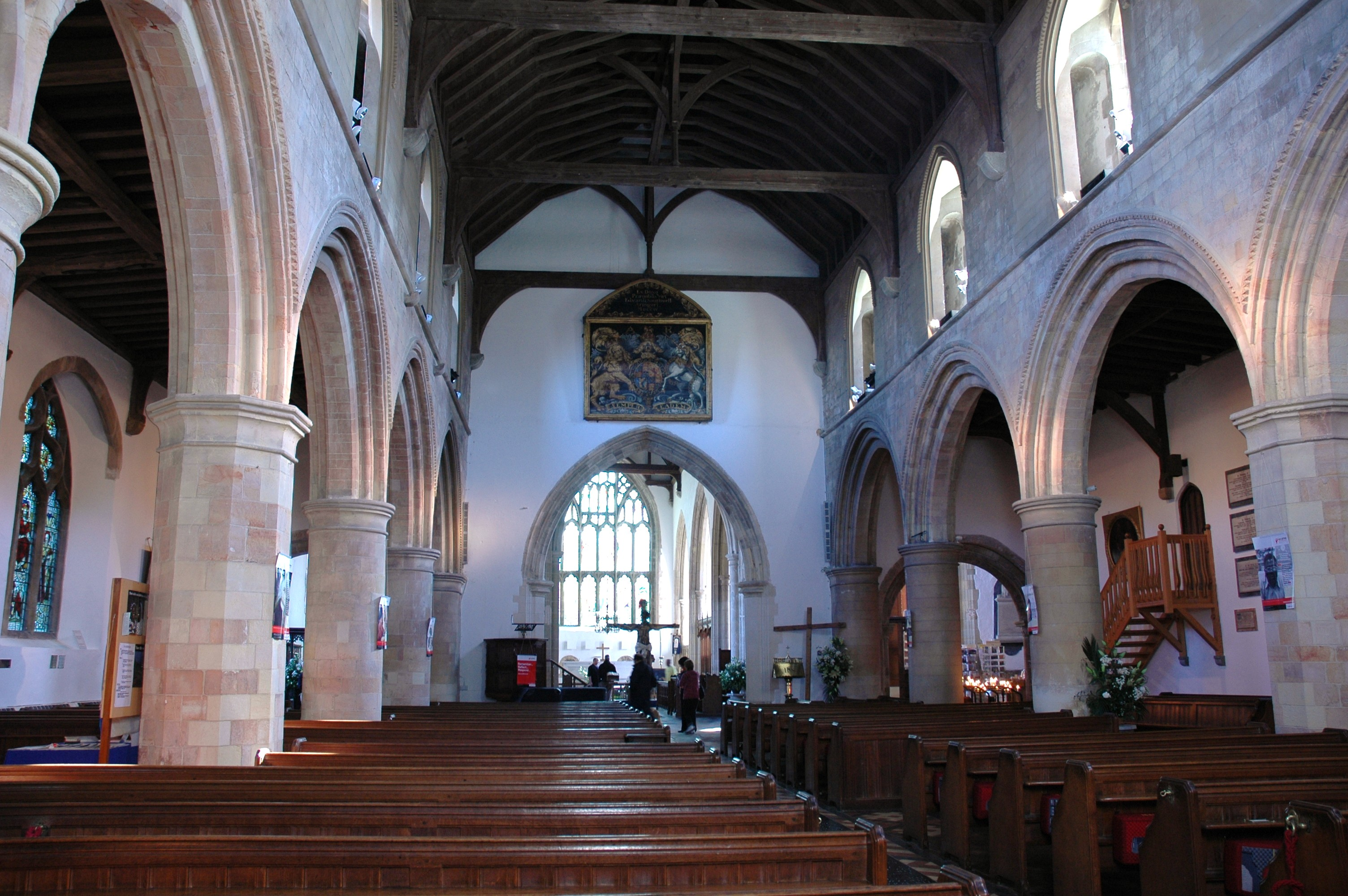 Santa Maria de Rye - Interior